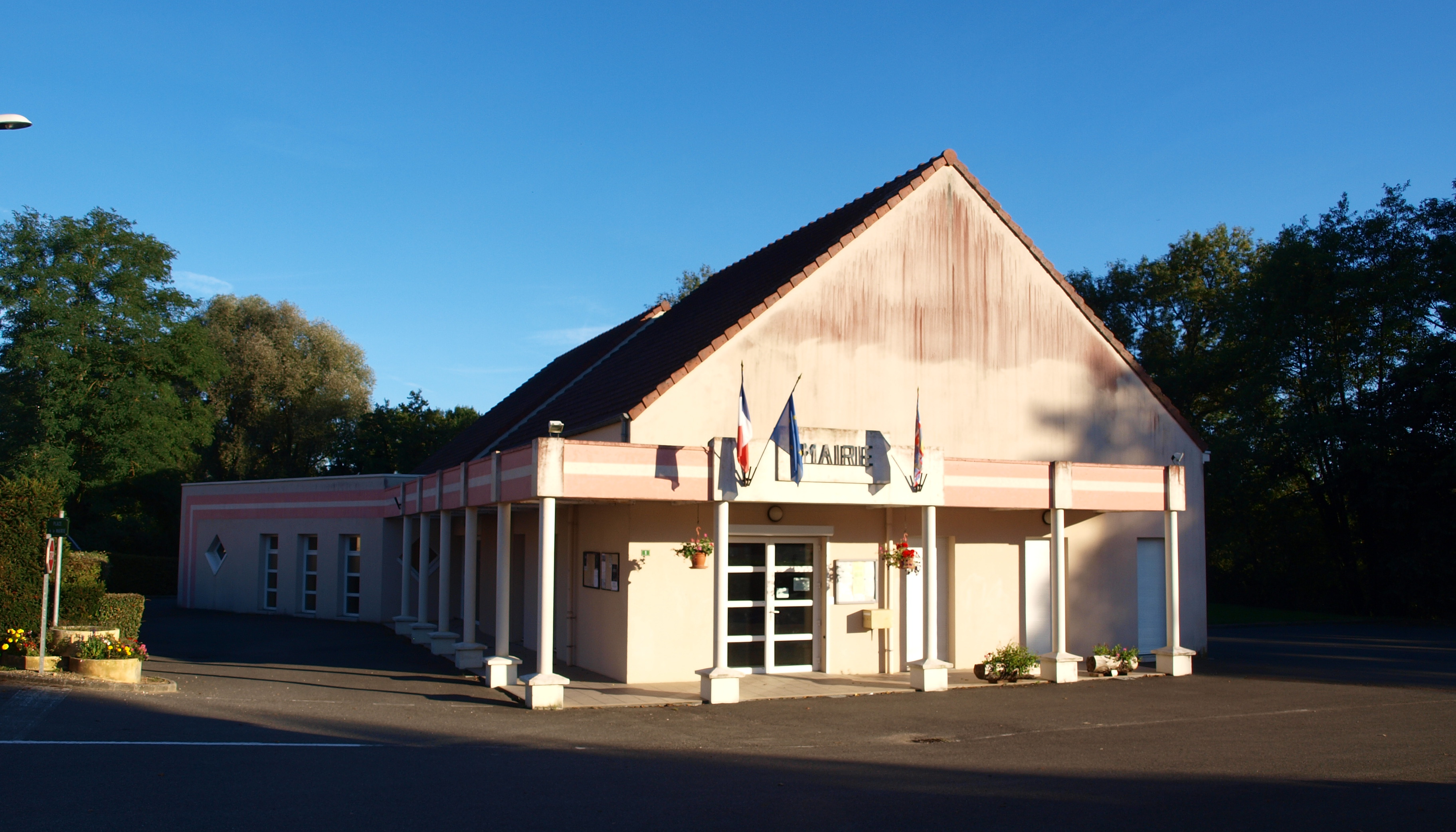 Moulins-sur-Ouanne ; mairie